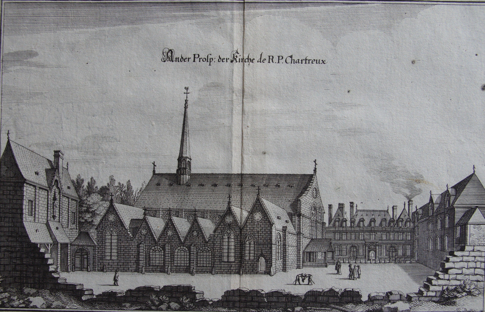 Chartreuse de Paris, d'après une gravure du XVIIe siècle. Merian (1655).